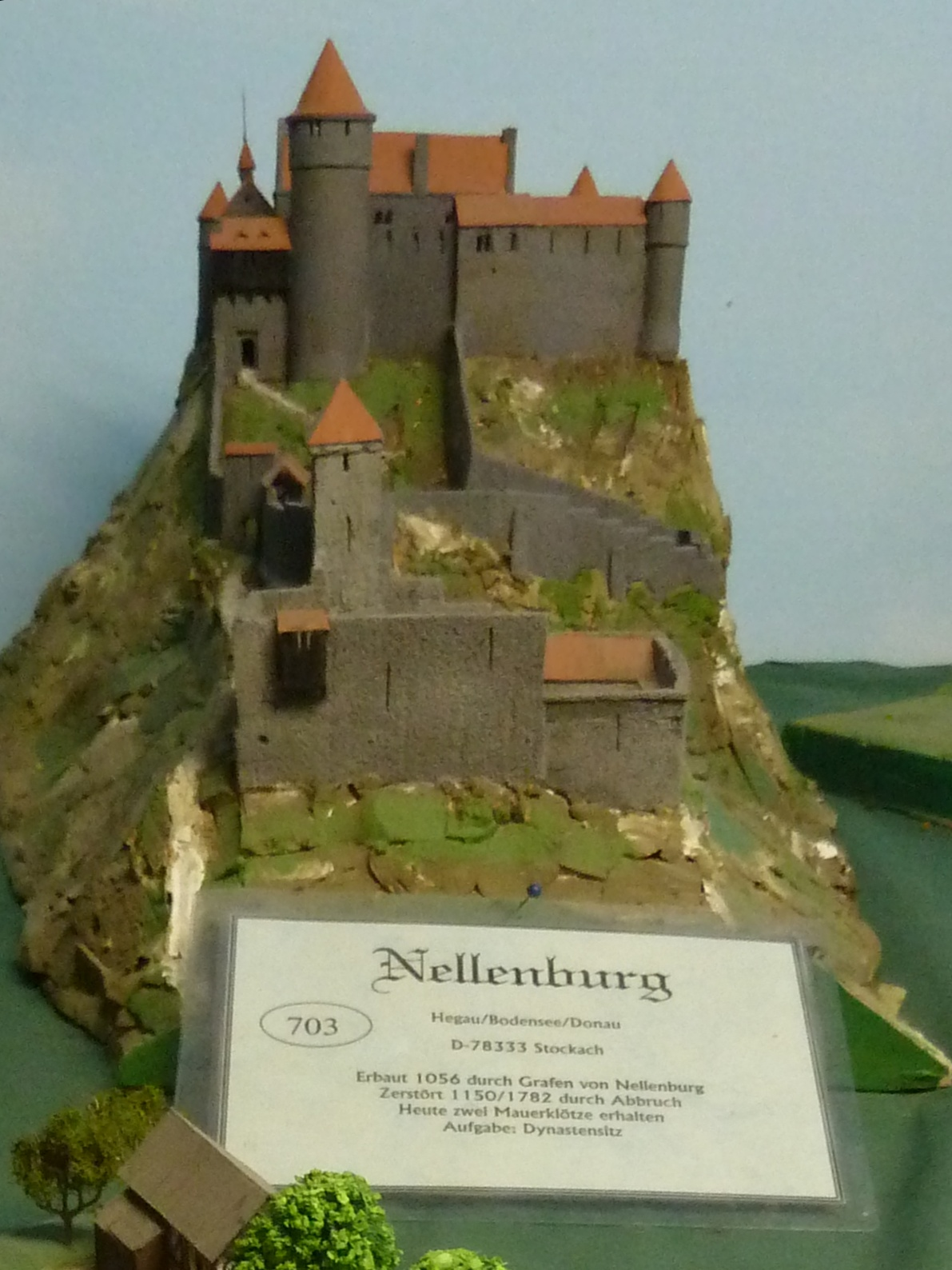 Rekonstruktion der Nellenburg in der Zinnfigurenklause